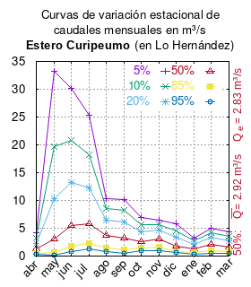 Curvas de variación estacional del Estero Curipeumo en Lo Hernández. # Dirección General de Aguas # Diagnóstico y clasificación de los cursos y cuerpos de agua según objetivos de calidad. Cuenca del río Maule. # Santiago de Chile # Ministerio de Obras Públicas (Chile) # 2004 # url: # urlarchivo: # Tabla 4.7: Estero Curipeumo en Lo Hernández (m3/s) pág. 55 mes 5% 10% 20% 50% 85% 95% abr 4.153 3.201 2.323 1.229 0.515 0.279 may 33.302 19.675 10.380 3.014 0.598 0.190 jun 30.156 20.811 13.251 5.526 1.787 0.859 jul 25.298 18.238 12.269 5.752 2.262 1.308 ago 10.380 8.497 6.531 3.647 1.474 0.762 sep 10.170 8.170 6.109 3.175 1.114 0.509 oct 6.983 5.636 4.347 2.647 1.436 1.003 nov 6.500 5.594 4.623 3.097 1.687 1.045 dic 5.844 4.525 3.320 1.836 0.886 0.577 ene 3.243 2.702 2.145 1.321 0.625 0.333 feb 5.014 4.215 3.382 2.123 1.006 0.499 mar 4.382 3.567 2.759 1.629 0.754 0.414 This plot was created with Gnuplot.